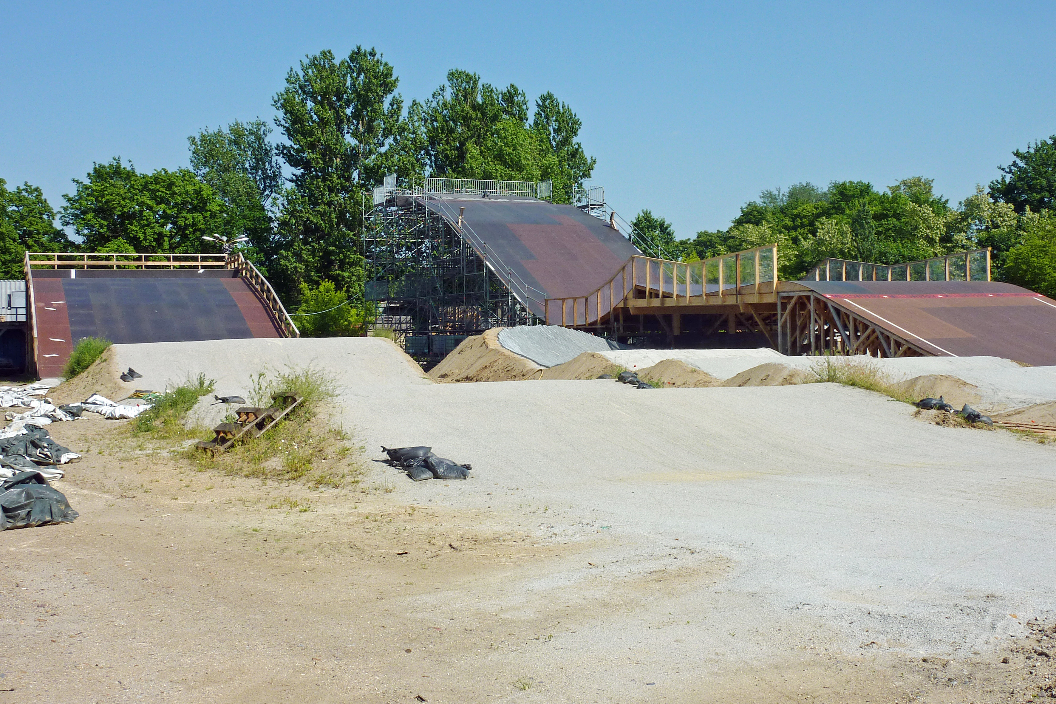 Rampen im Mellowpark in Berlin-Oberschöneweide.